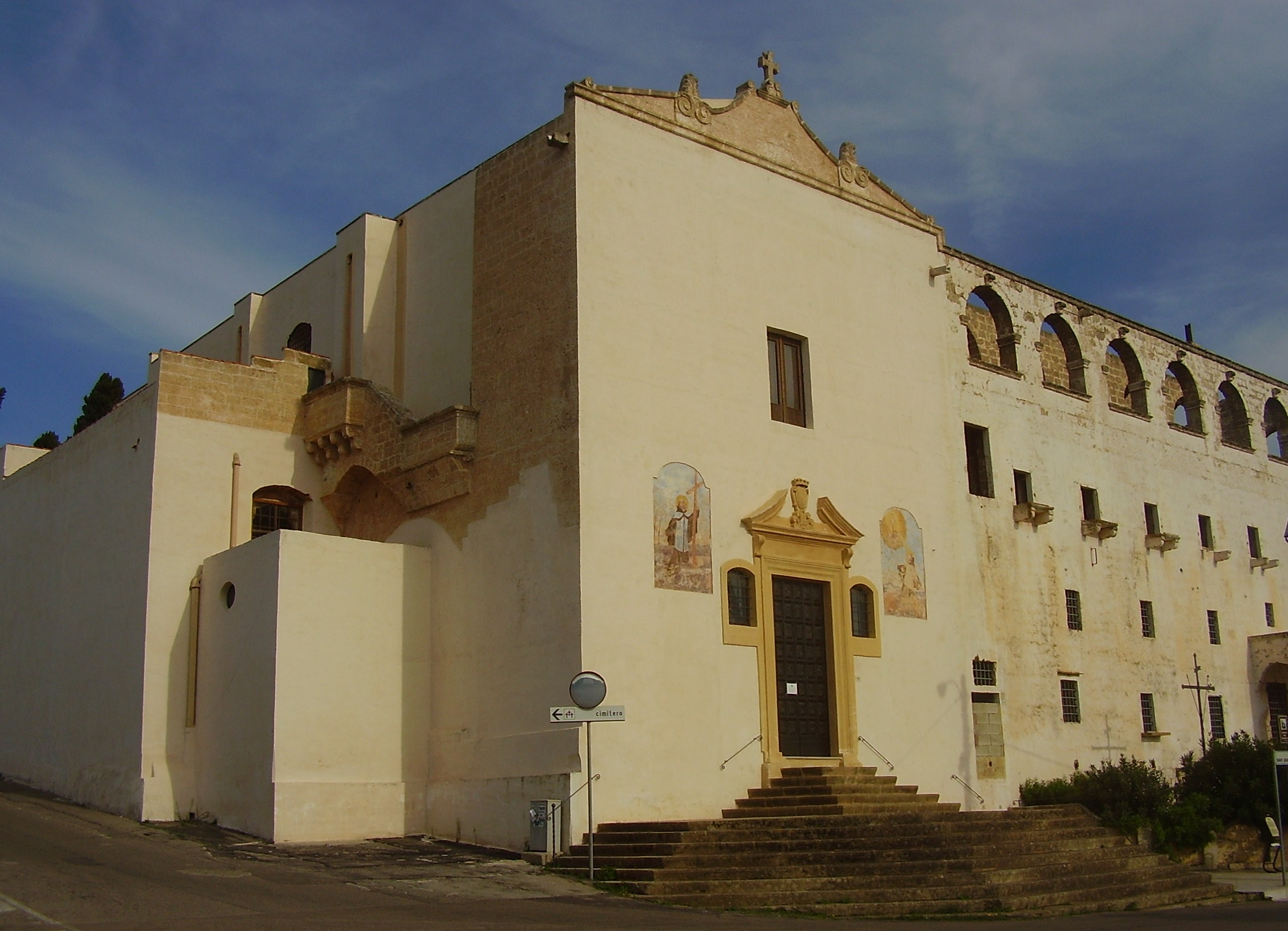 Chiesa del Crocifisso Parabita, Lecce